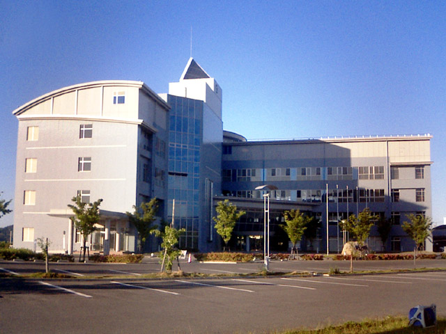 さぬき市の市役所 - 日本国香川県さぬき市。